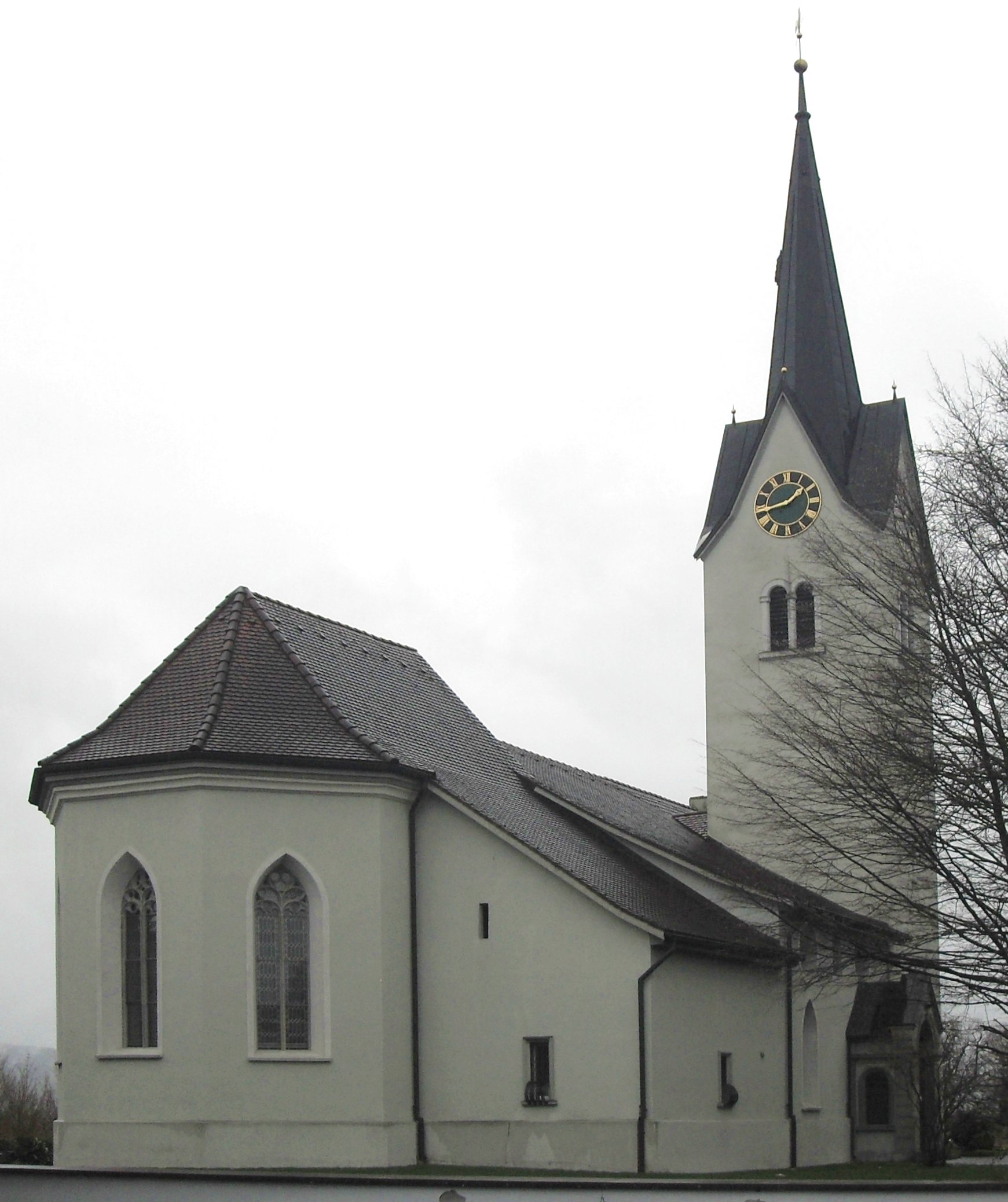 Reformierte Kirche St. Georg in Wigoltingen, Kanton Thurgau, Schweiz